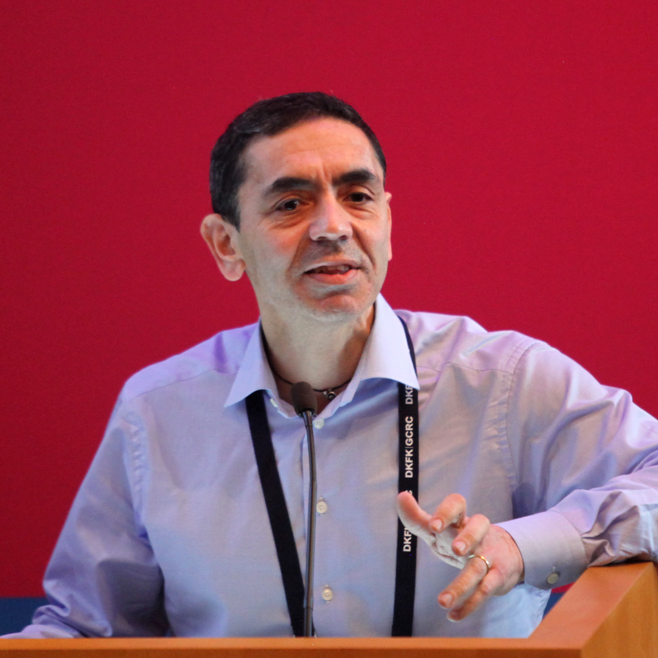 Uğur Şahin, bei einem Vortrag beim 1. Deutschen Krebsforschungskongress am 4. Februar 2019 in Heidelberg